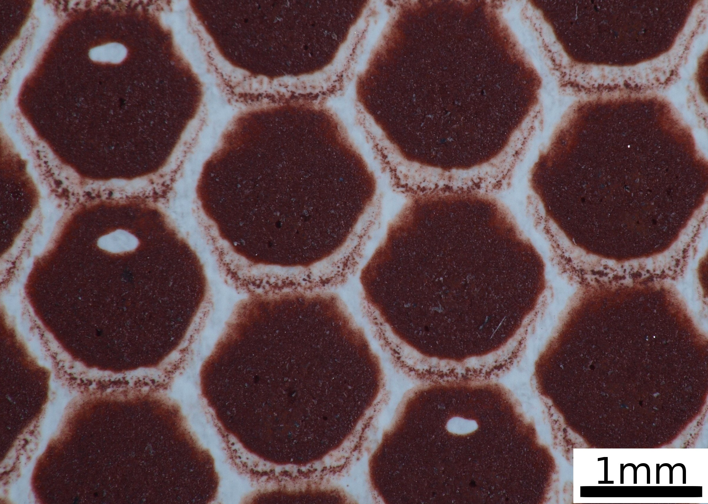 Reibfläche einer Streichholzschachtel